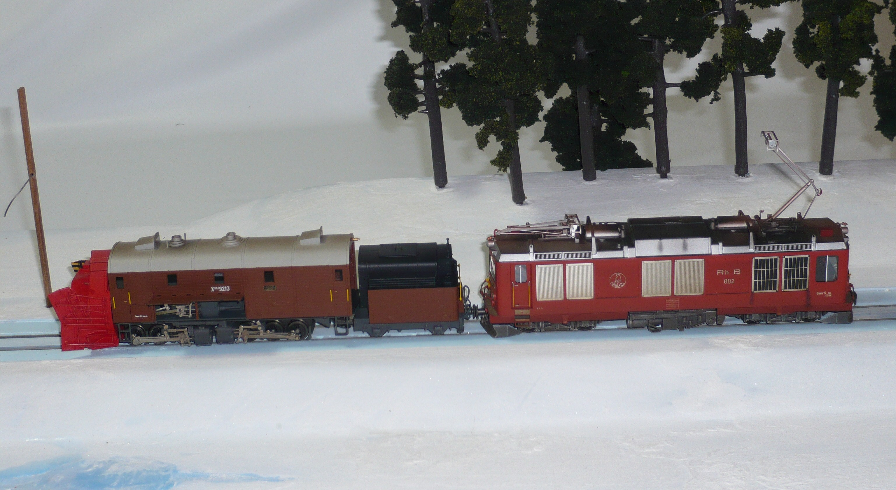 フェロースイス製HOm両用機関車